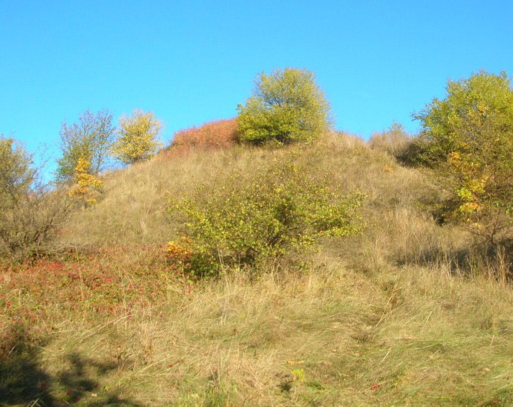 Wierzchołek grodziska kultury łużyckiej oraz prasłowiańskiego w Zamczysku (Bydgoszcz)